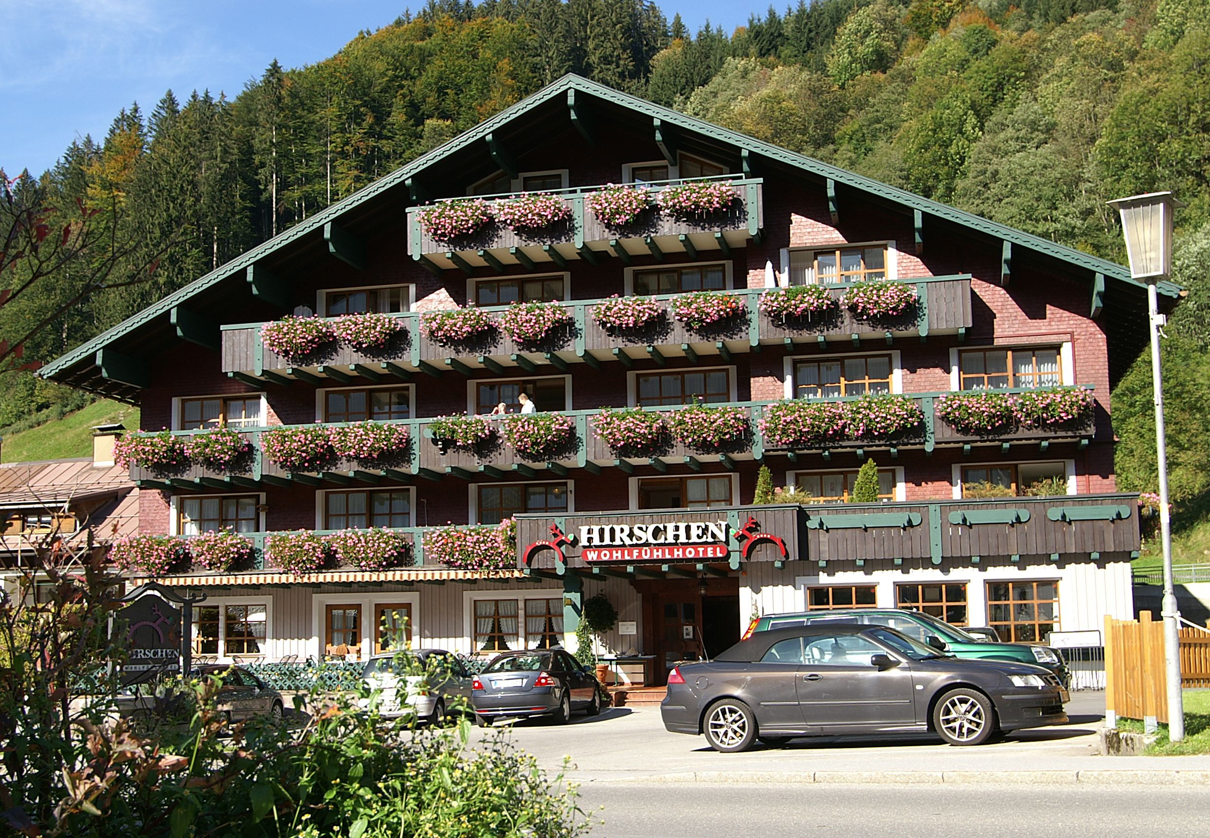 Hotel Hirschen in Schoppernau , Vorarlberg